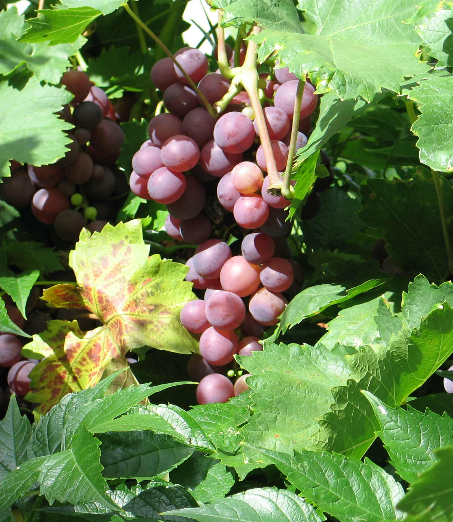 Wäirief